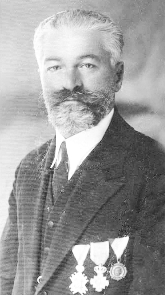 Simo Budimir (1889-1941) - ekonom, narodni poslanik i u dva navrata predsednik opštine Mrkonjić Grad.